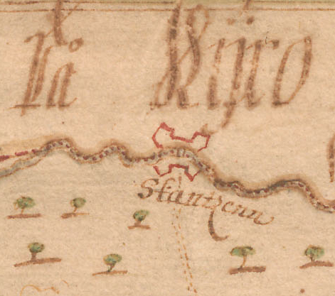 Ote Hämeenkyrön hallintopitäjän kartasta Delineation På Kyro Sochnn. Kartta on piirtänyt Turun- ja Porin läänin vakinainen maanmittari Hans Hansson vuoden 1650 tienoilla. Kansallisarkisto, Maanmittaushallituksen kartat, MH 13.